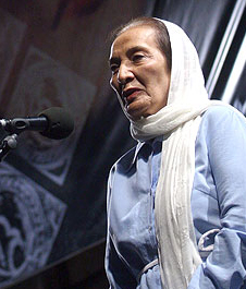 فهیمه راستکار در افتتاحیه ششمین جشنواره تئاتر بانوان ۱۶ تیر ۱۳۸۶